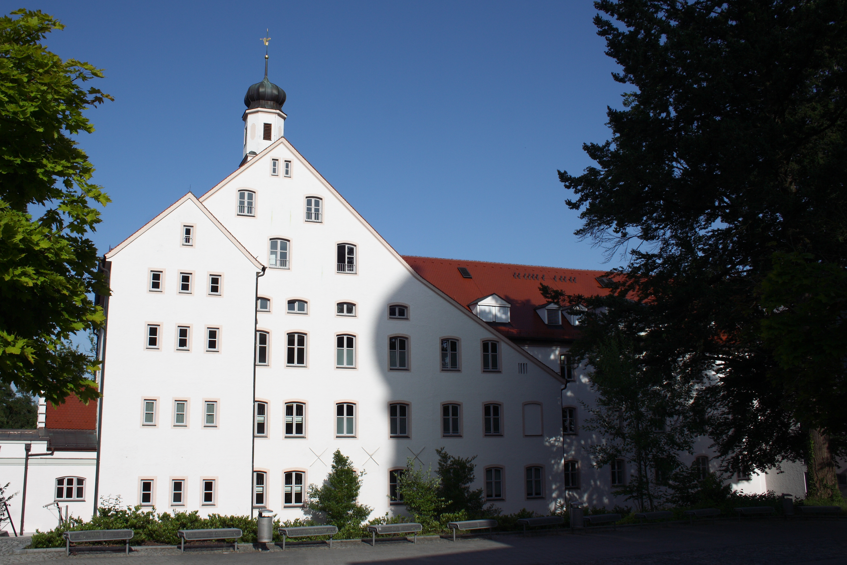 Klosters Ursberg in Ursberg im Landkreis Günzburg (Bayern)